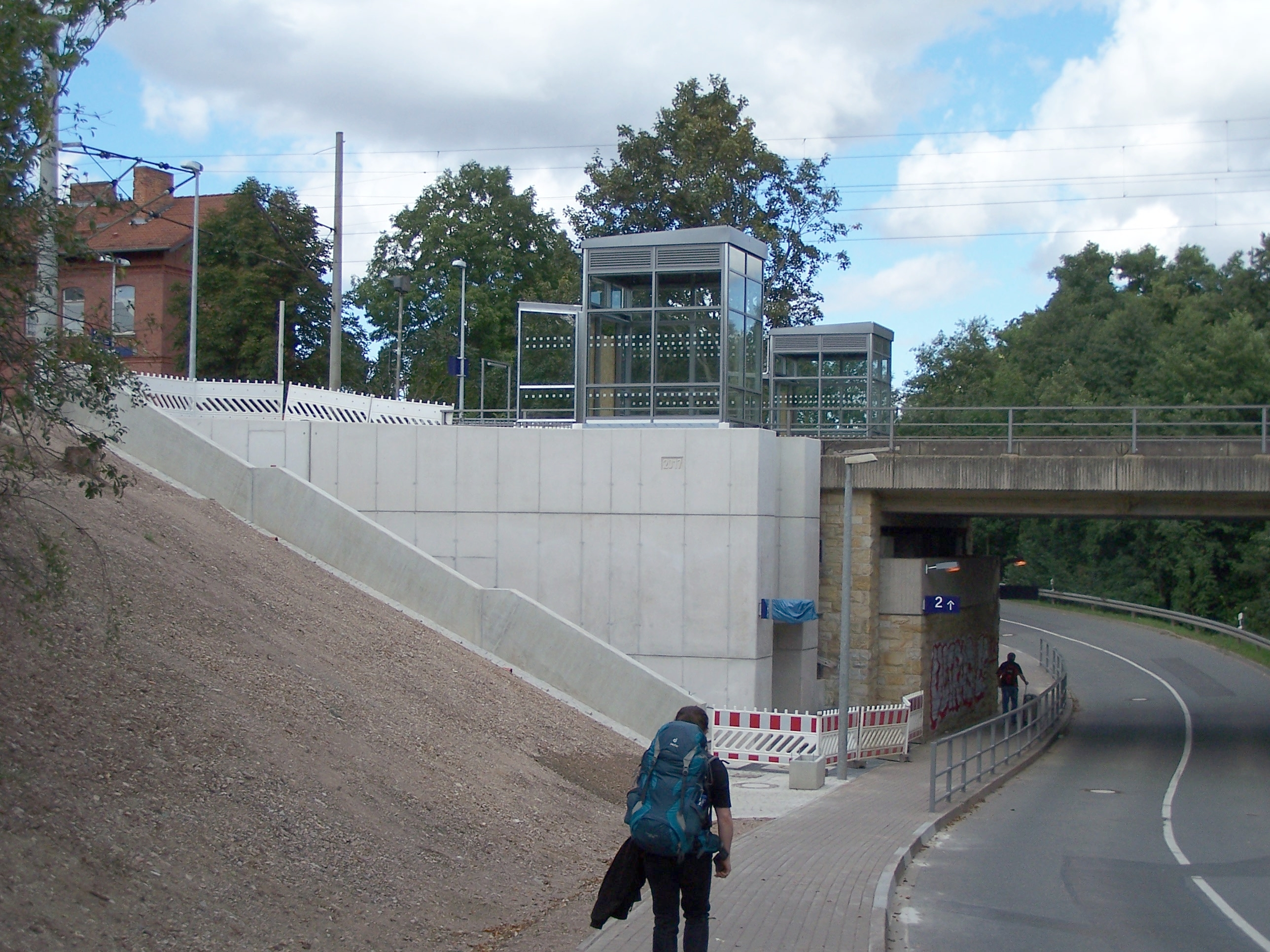 Ansichten und Details zu den Umbauarbeiten 2017 im Bereich des Bahnhofs Fröttstädt.